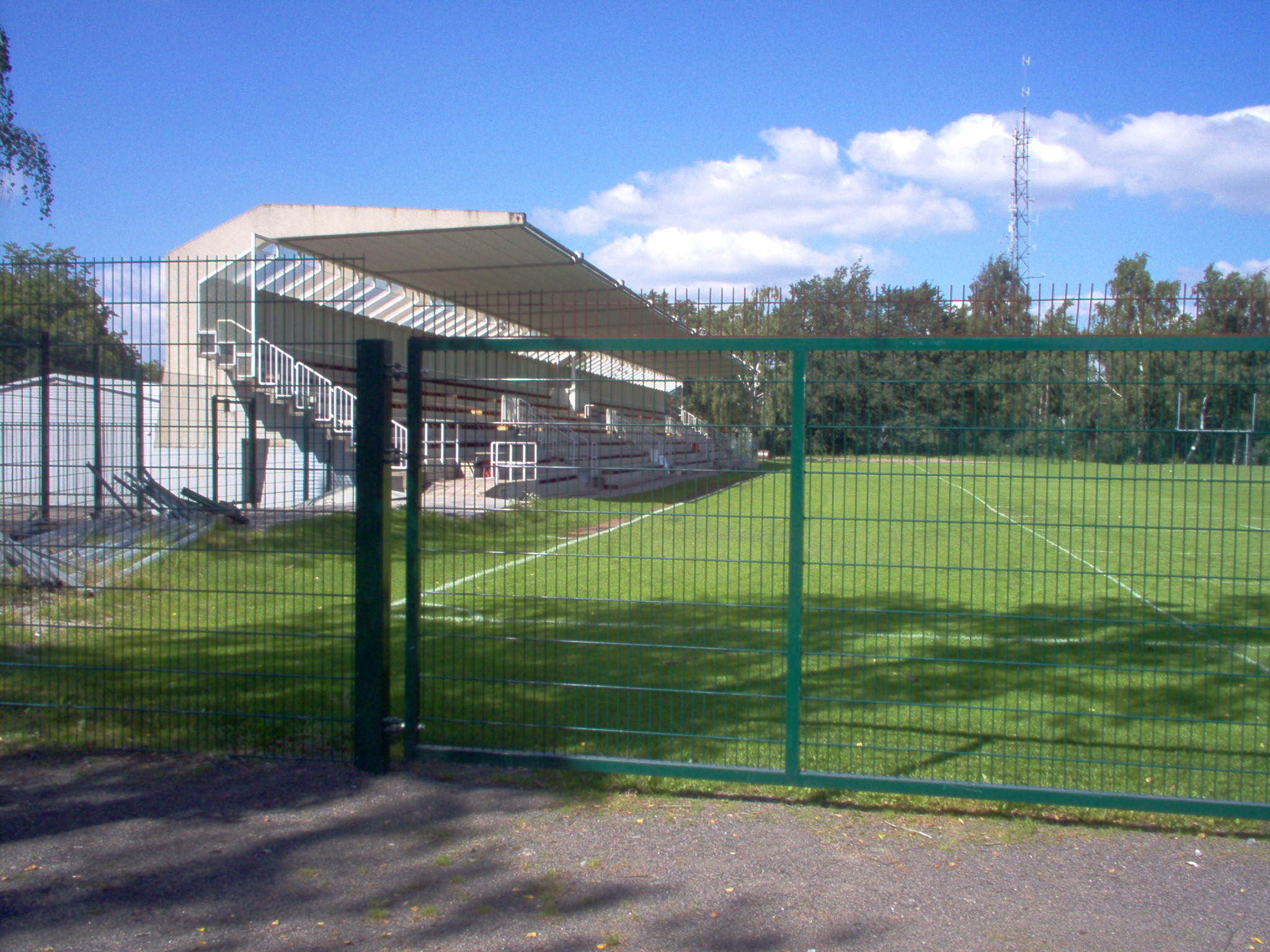 Turun urheilupuiston yläkenttä